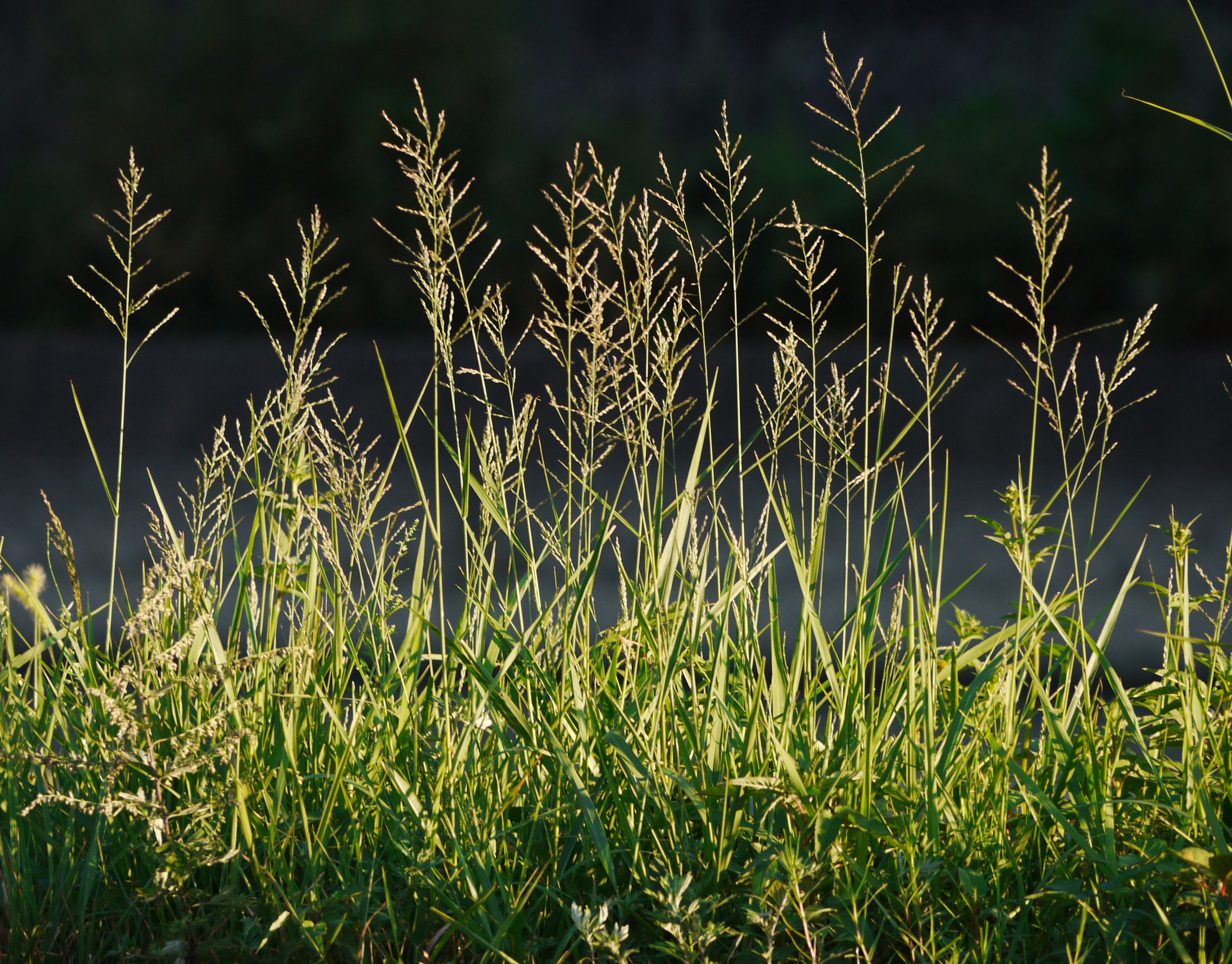 Arundinella hirta トダシバ 和歌山県田辺市 2011.10.01